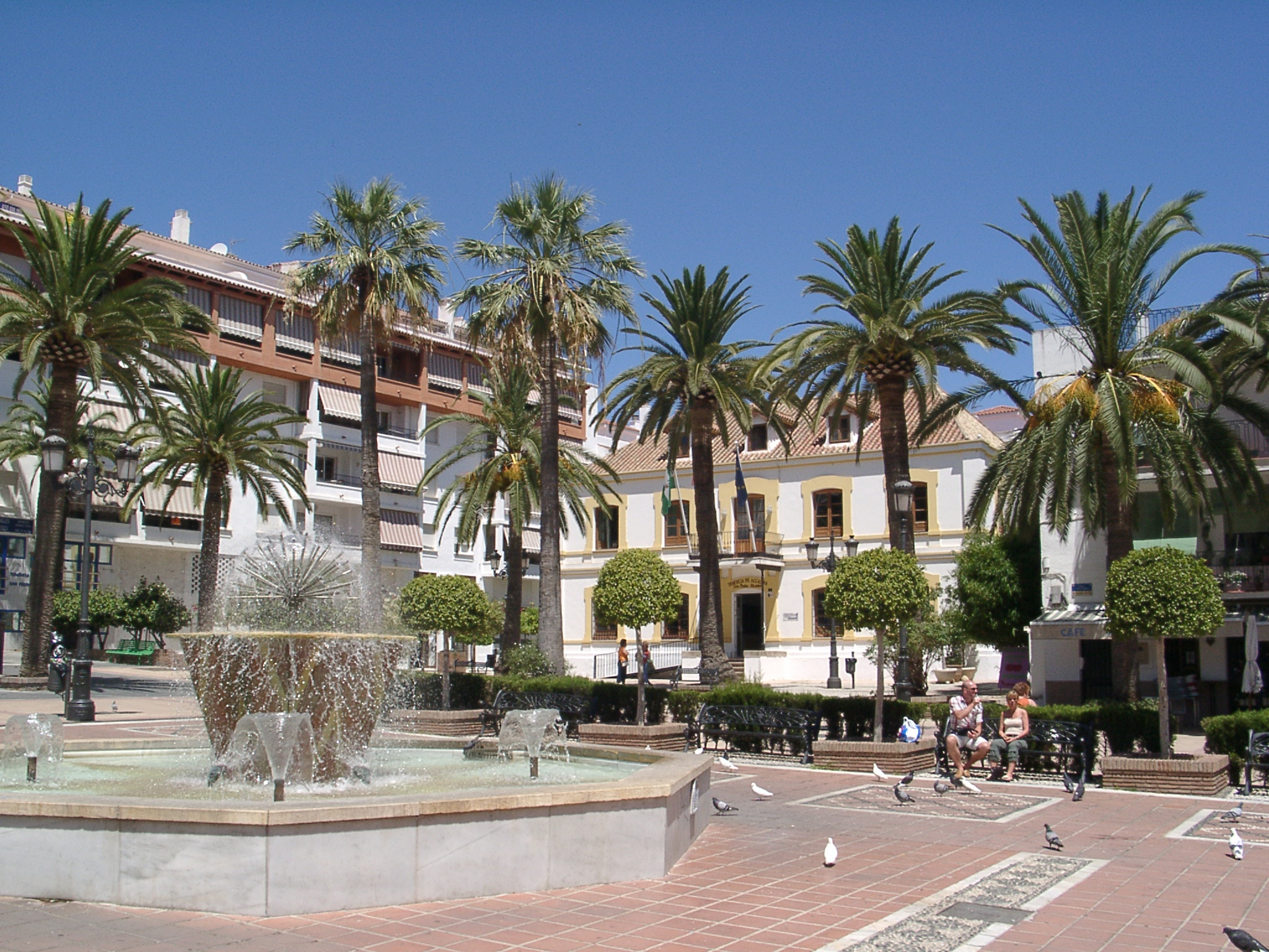 San Pedro Alcantara